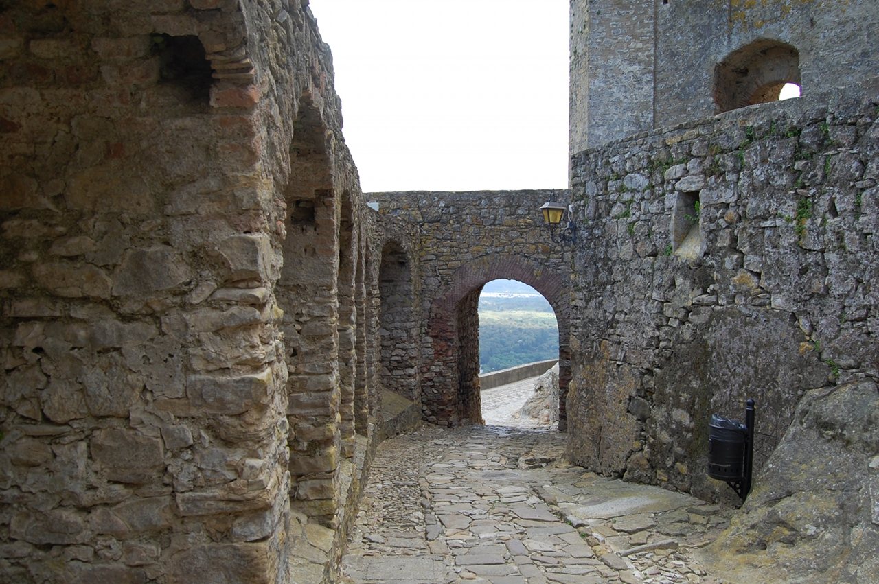 Castellar de la Frontera.